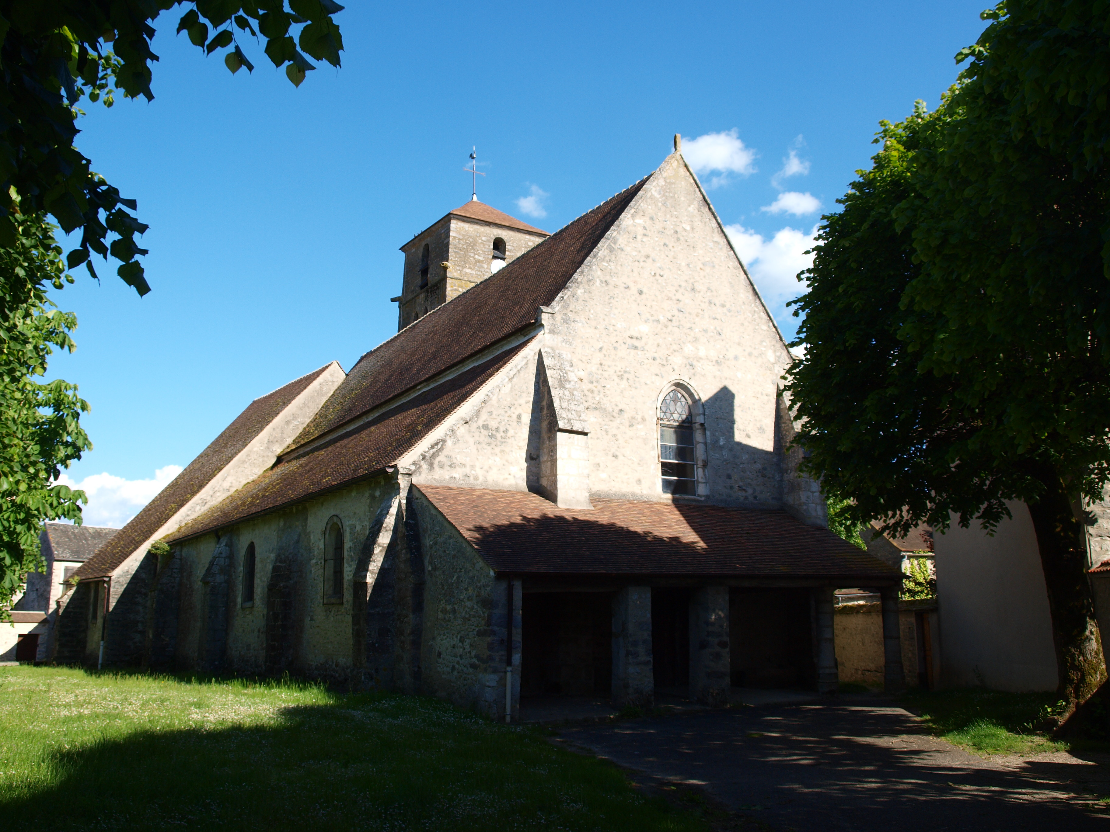 Bouville (Essonne), église